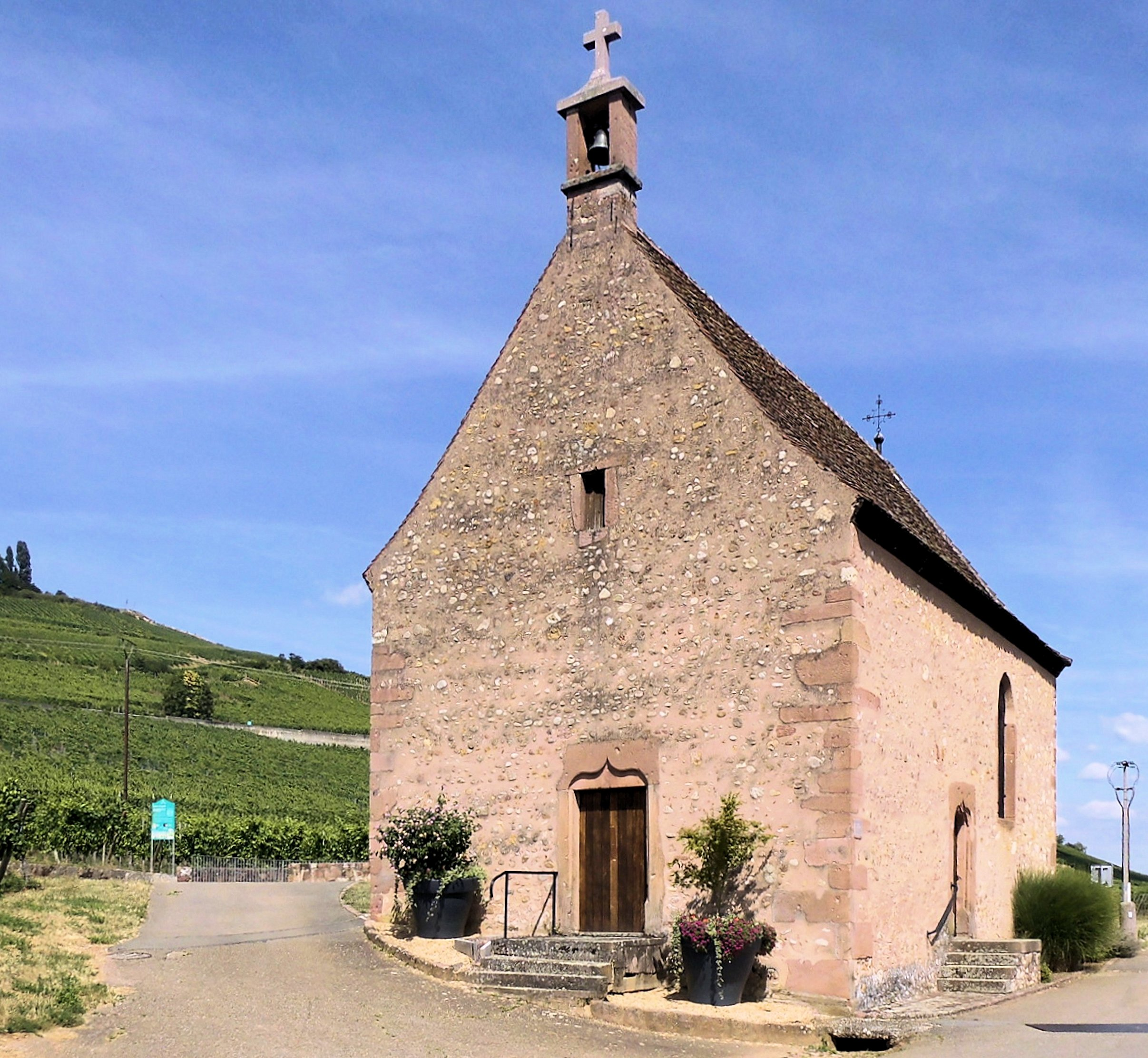 La chapelle Sainte-Anne à Sigolsheim